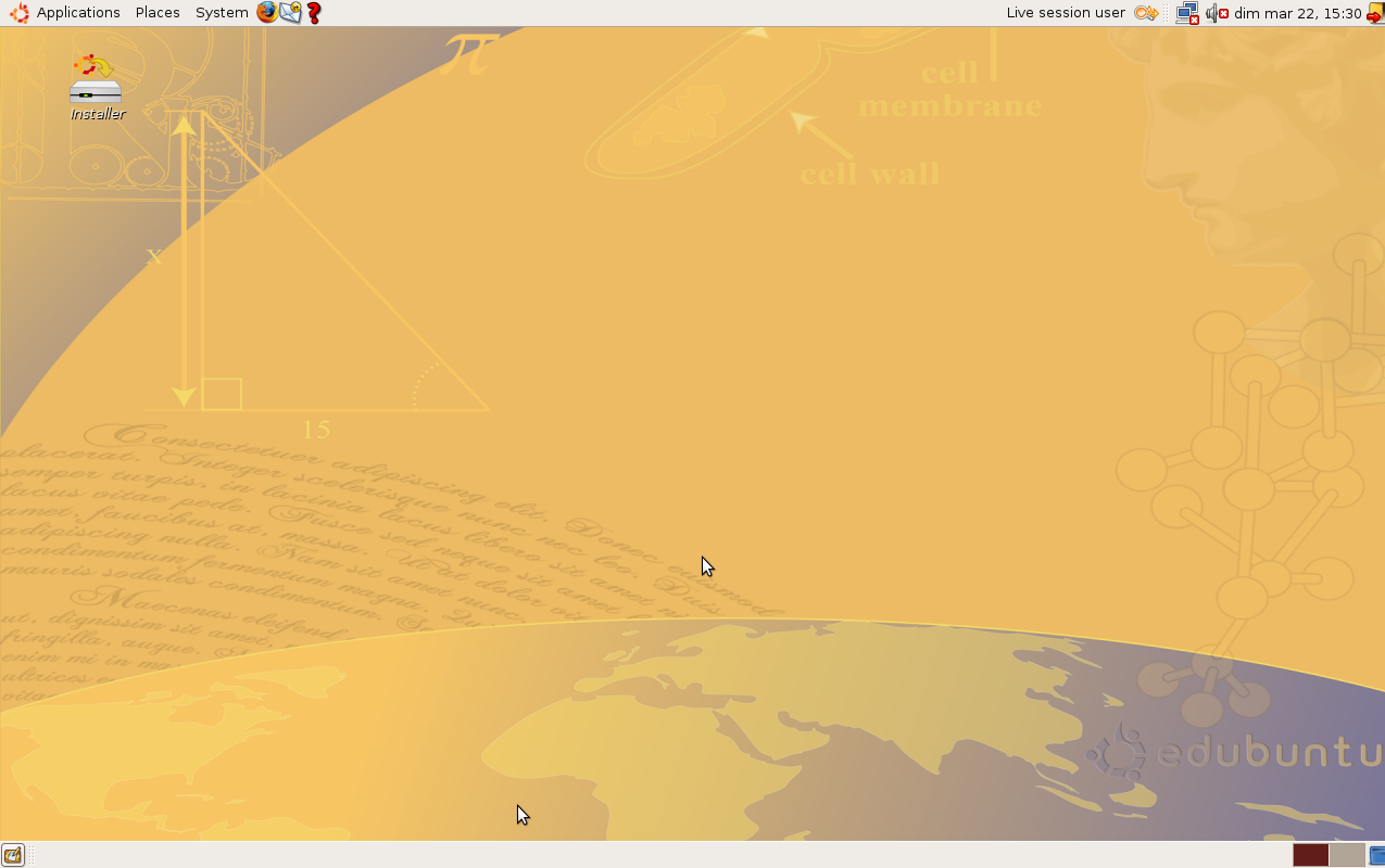 Premier écrans après demarage sur le CD